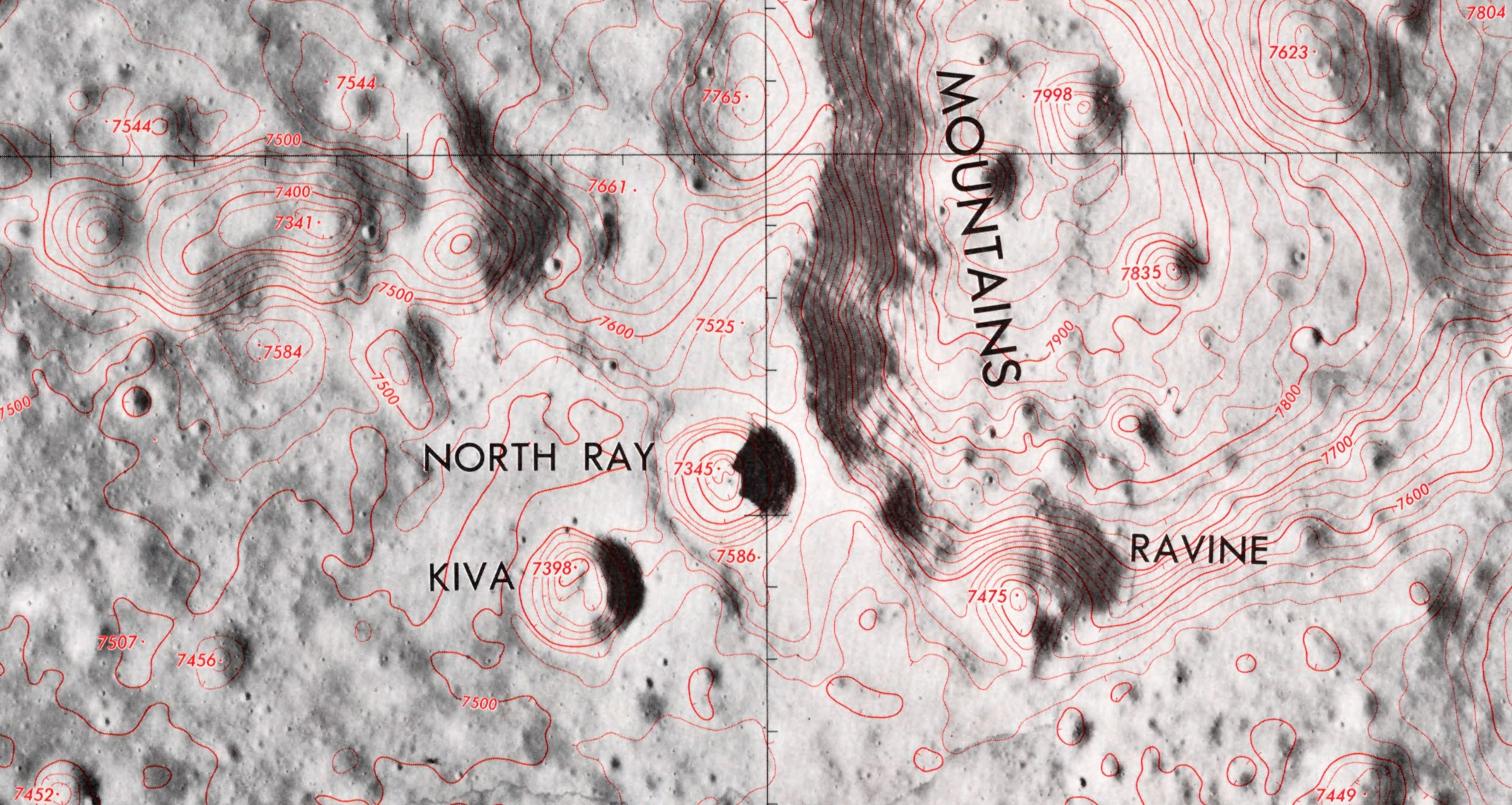 Lunar Topophotomap. Detalle plano 1/50.000